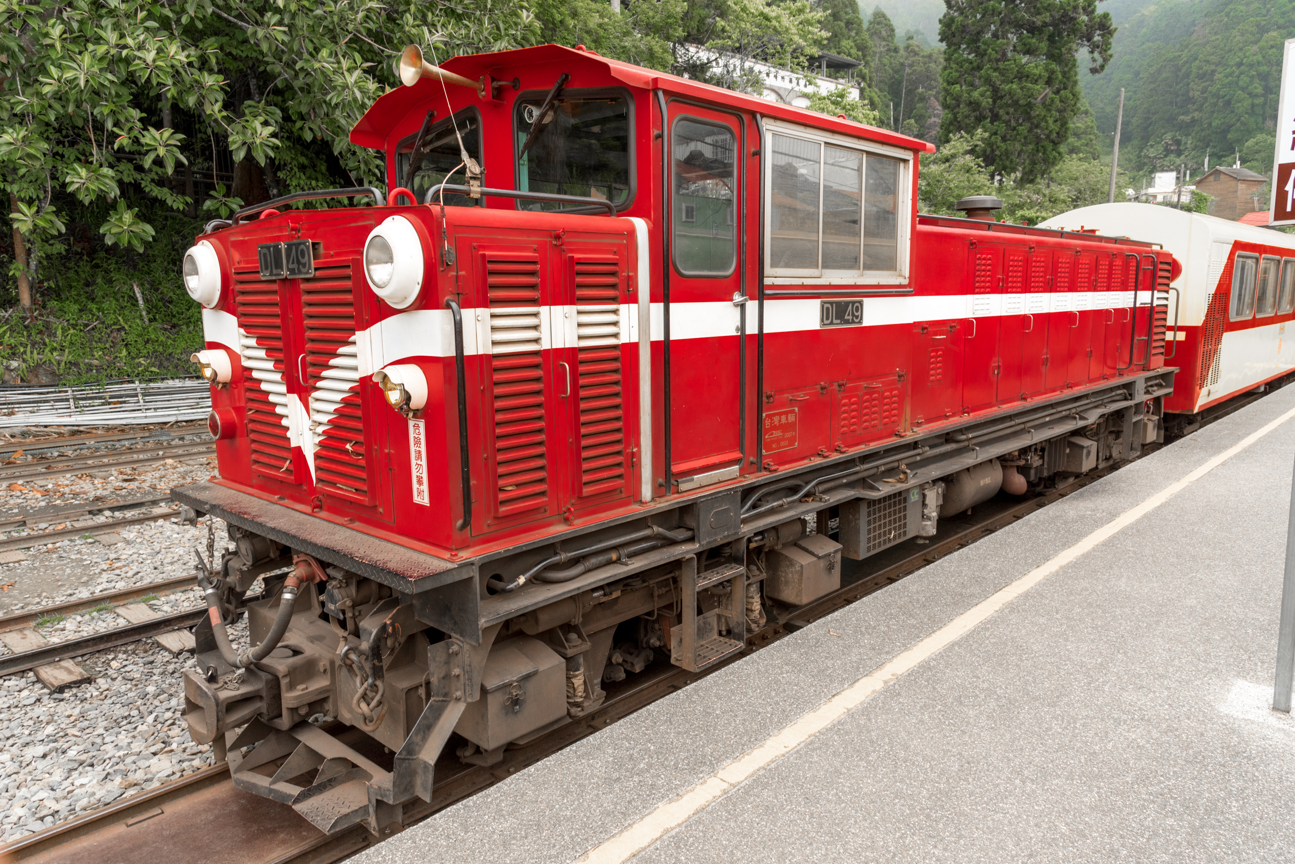 Diesellok DL49 des Alishan Forest Railway aufgenommen im Bahnhof von Fenchihu